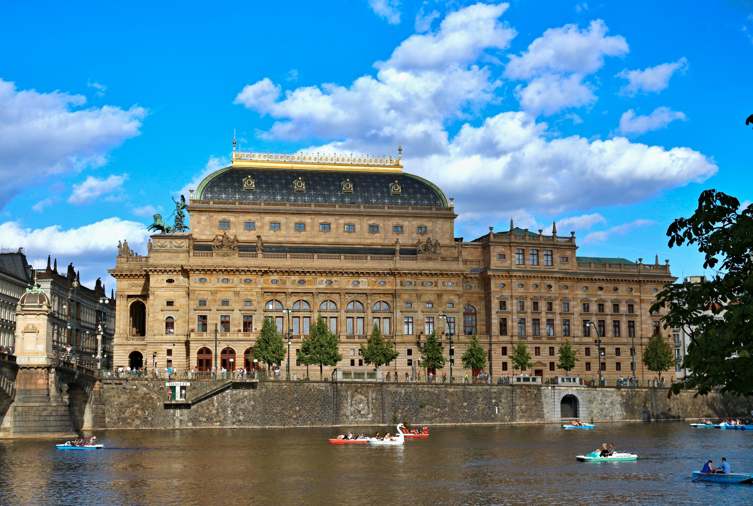 Národní divadlo v Praze